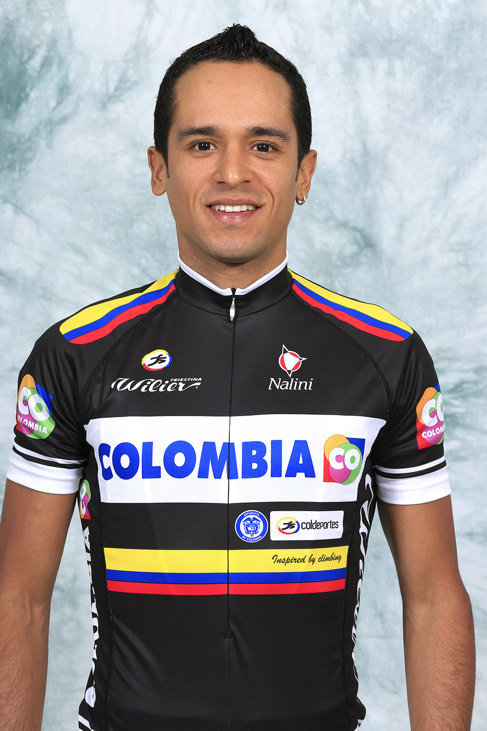 Dalivier Ospina en el 2013 con el Team Colombia